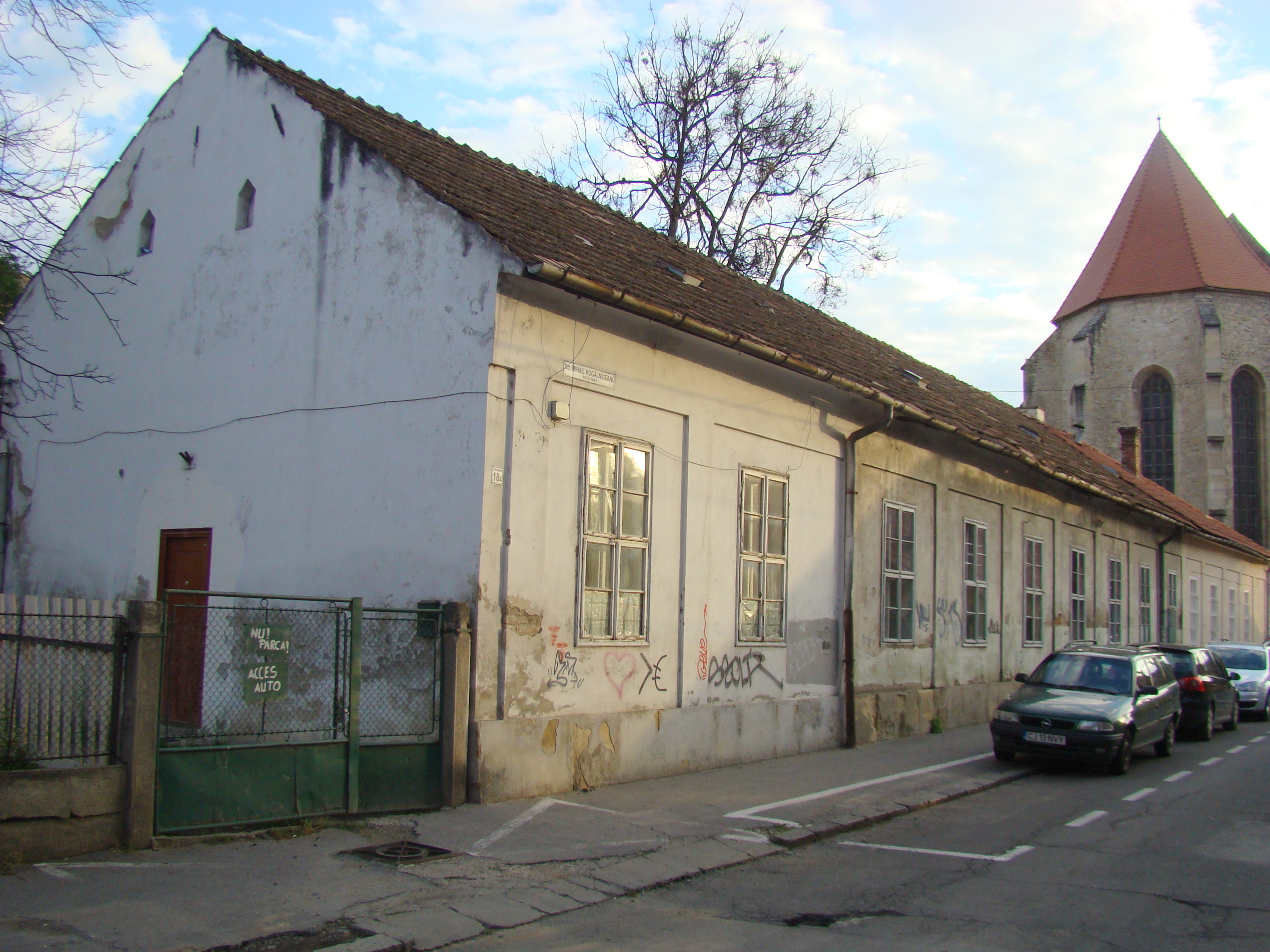 Tipografia Colegiului Reformat